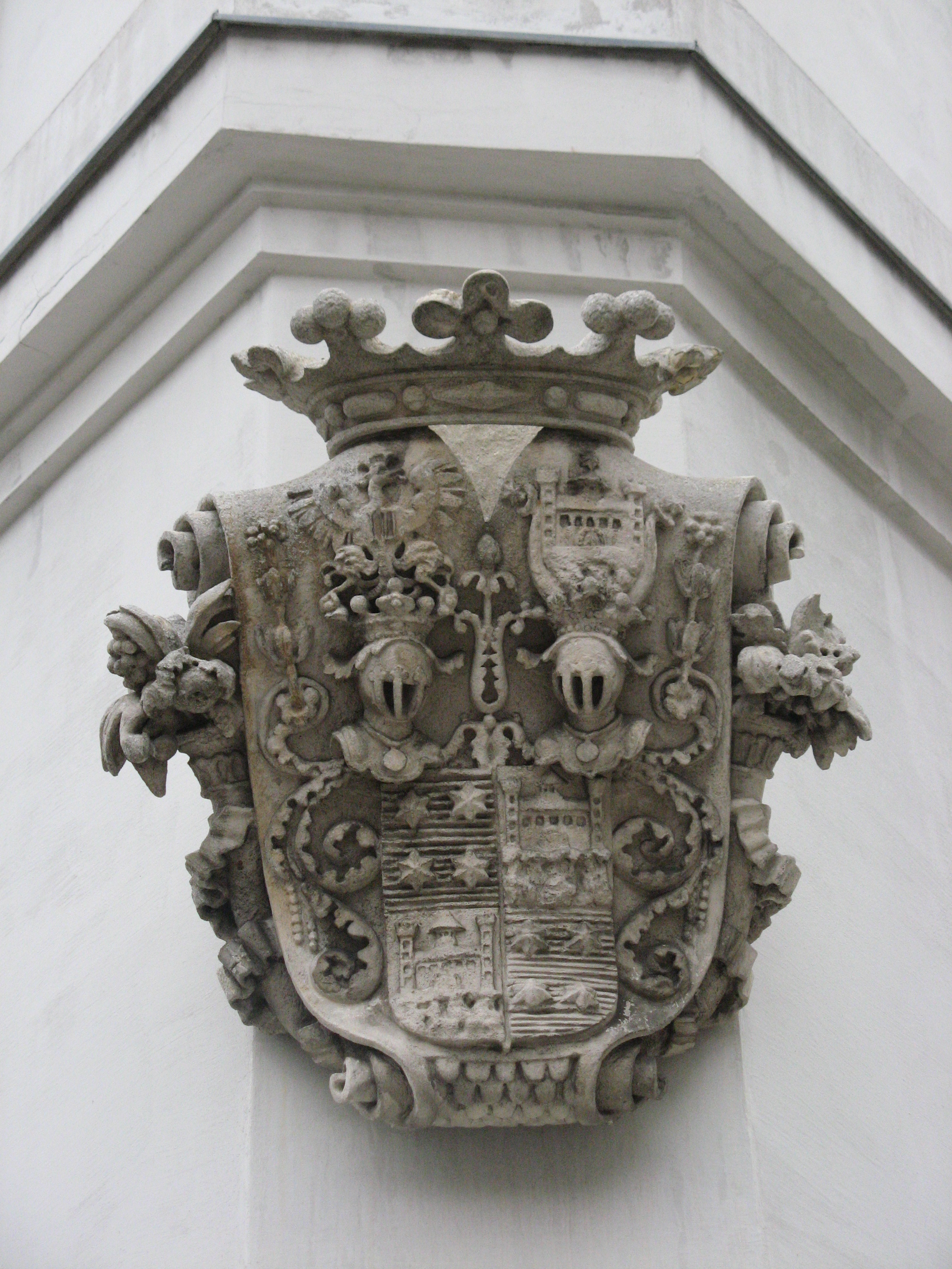 Wappen am Pasqualatihaus, Mölker Bastei 8, Wien-Innere Stadt